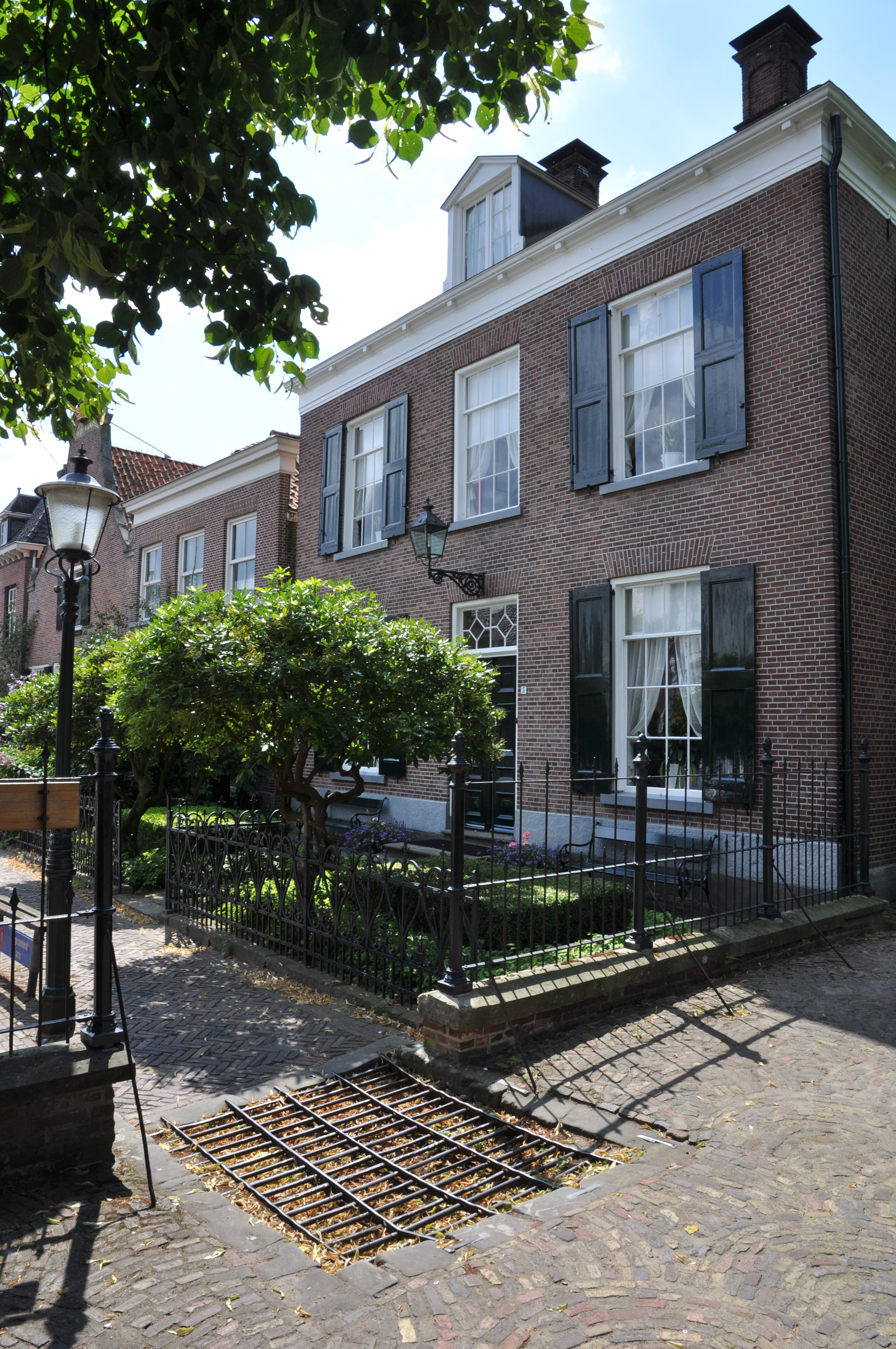 Duivelsrooster in Delden (Overijssel).